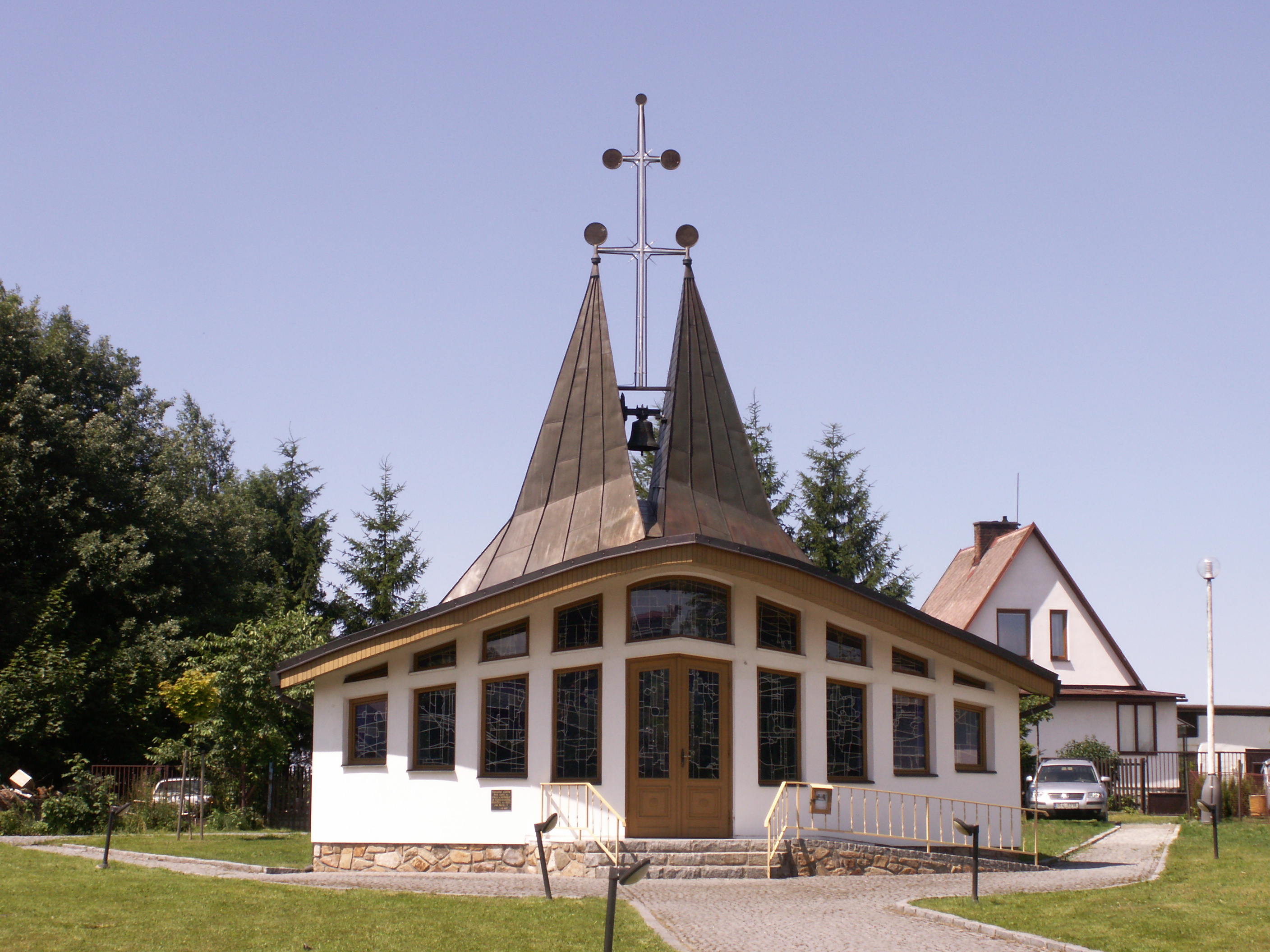 Škrdlovice - kaple svatého Cyrila a Metoděje